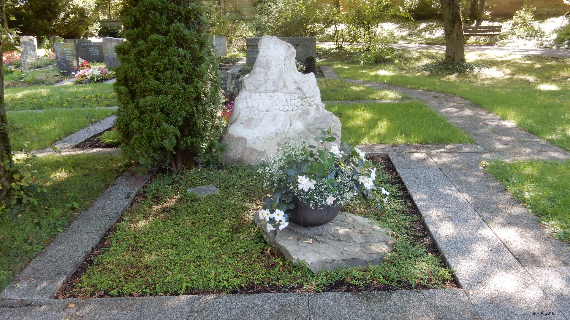 Grab von Manfred Winkelhock auf dem Waiblinger Friedhof, August 2016